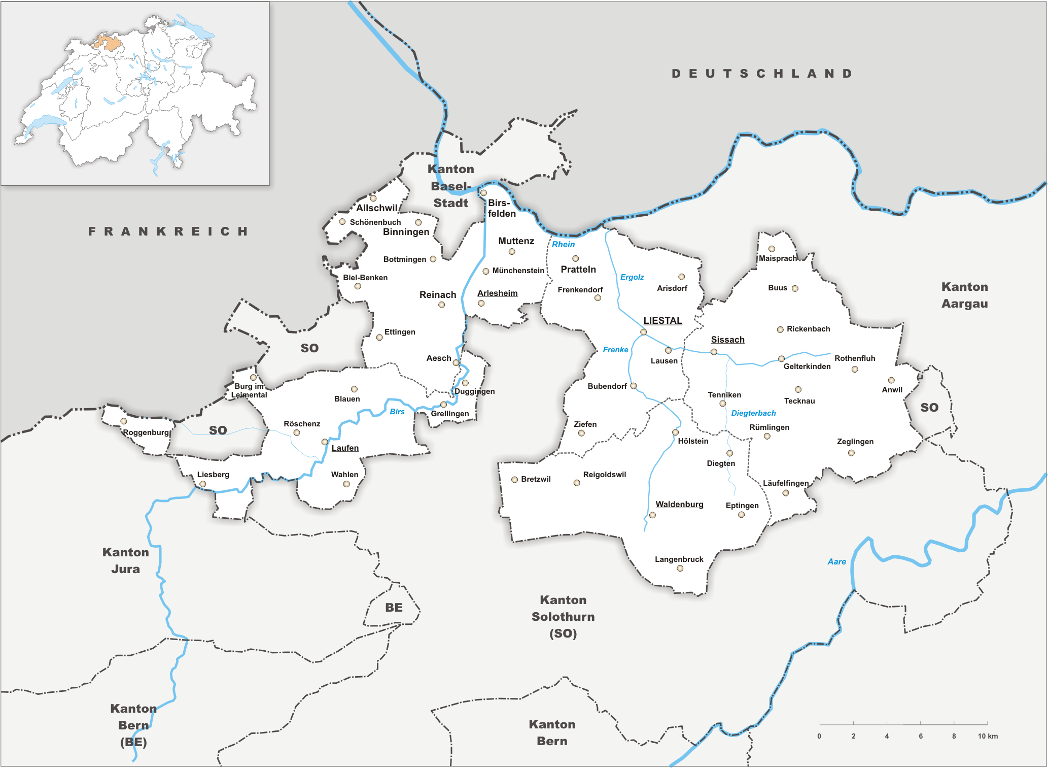 Karte des Kanton Basel-Landschaft.